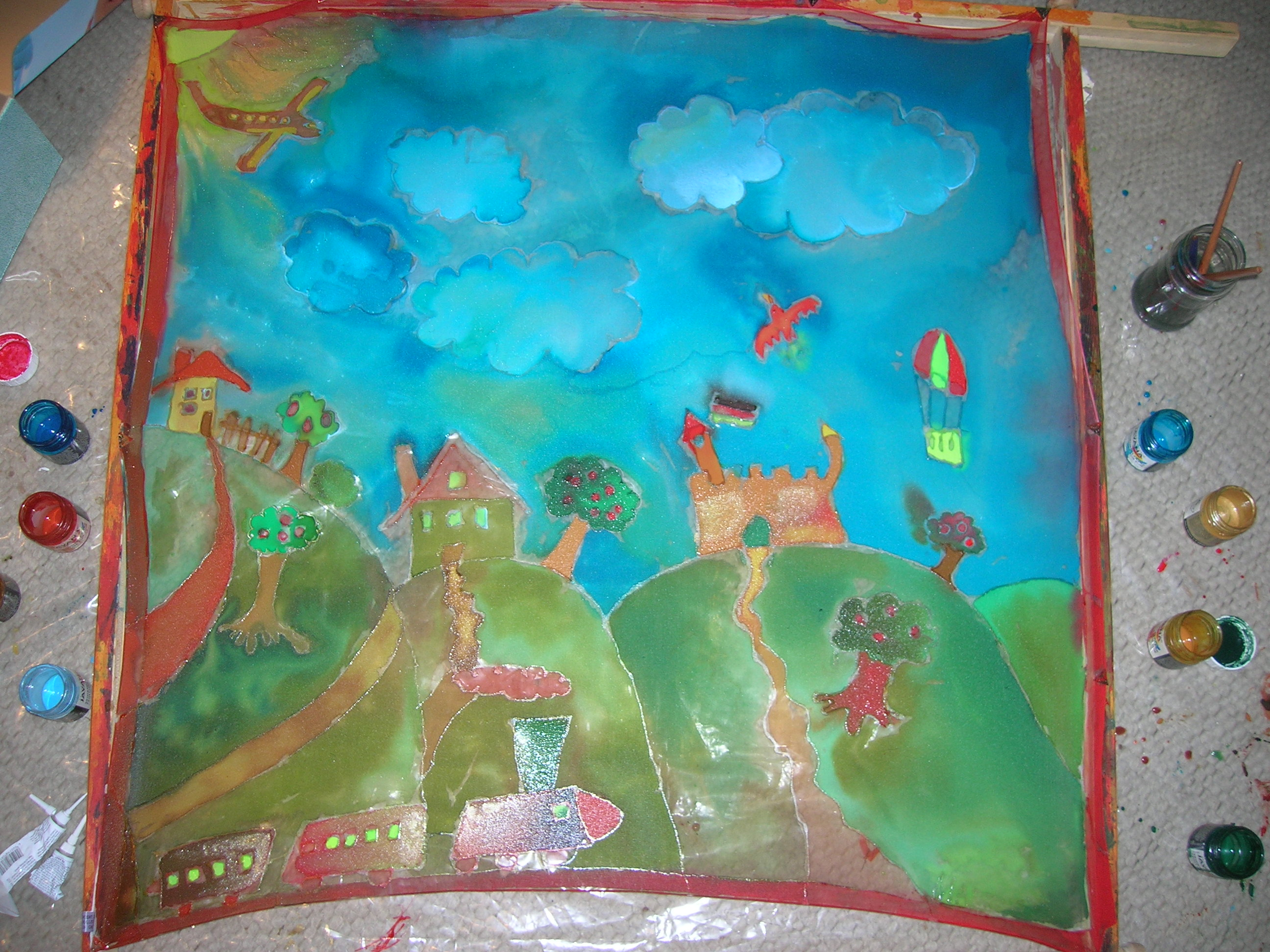 Seidentuch/silk painting by Markus and Andrea Schaufler